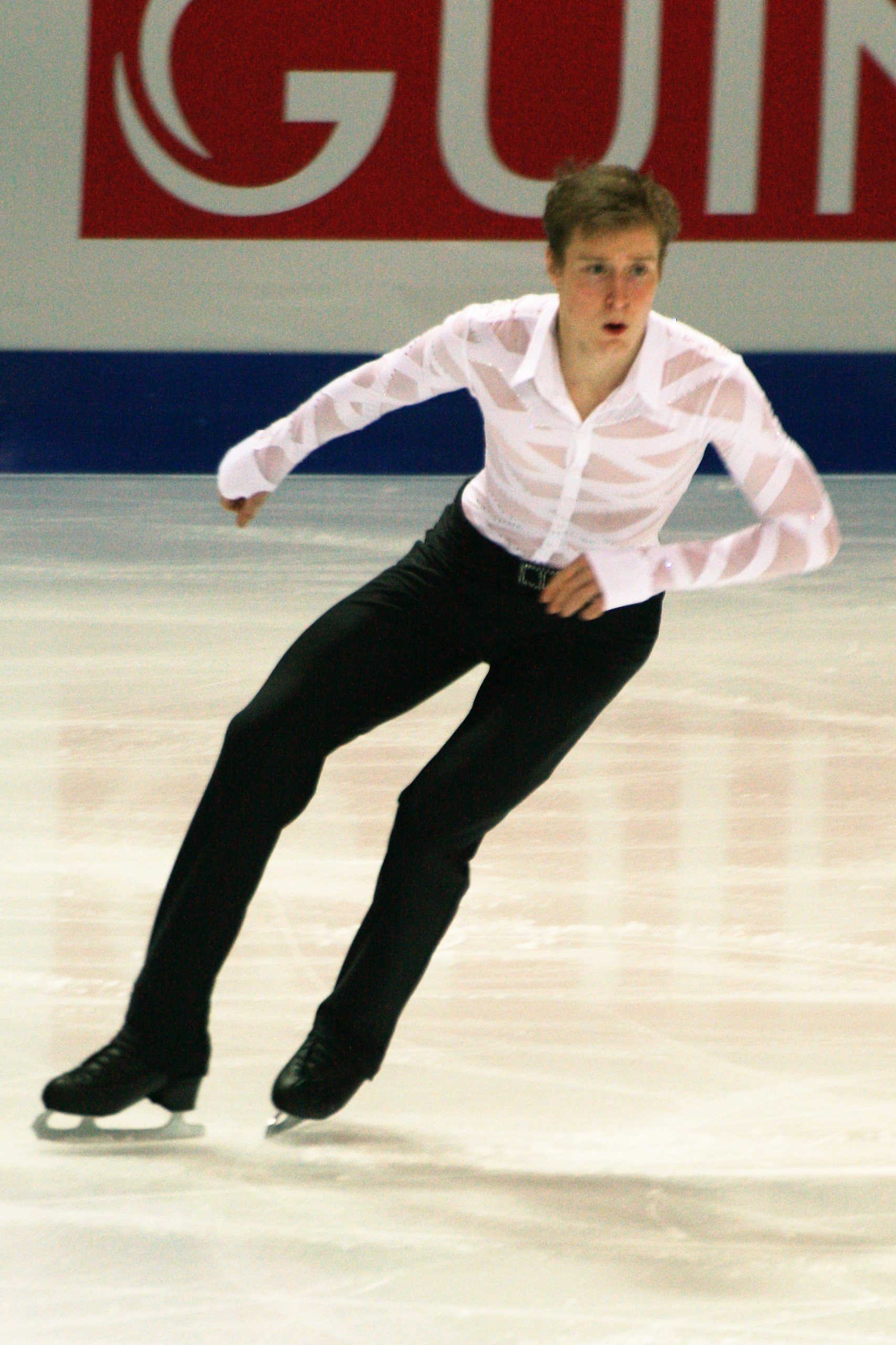 Александр Самарин (Россия) на финале Гран-при по фигурному катанию среди юниоров 2016-2017